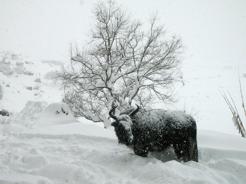 Shivering yak.. Forever Winter